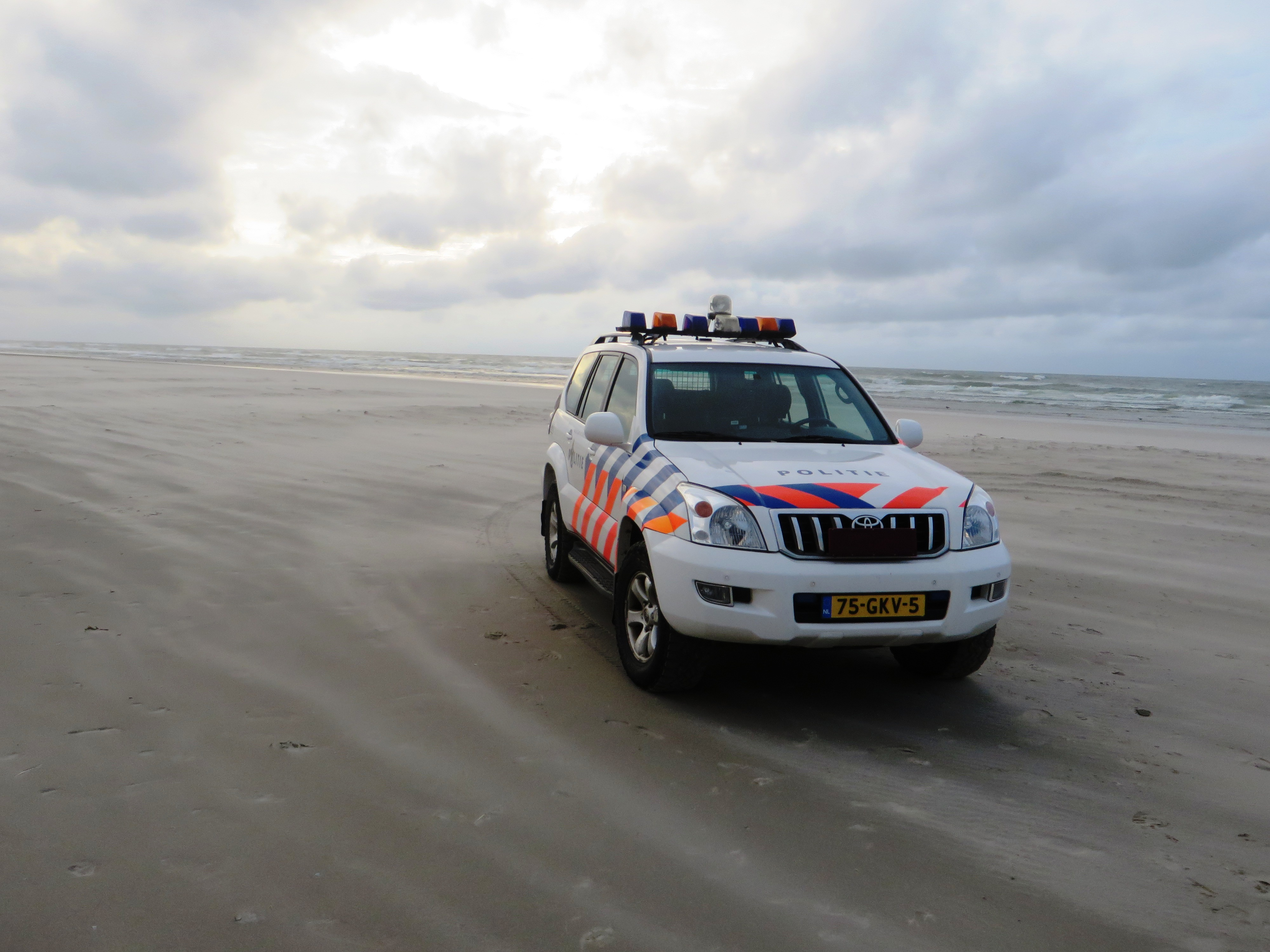 Politie auto's op Terschelling